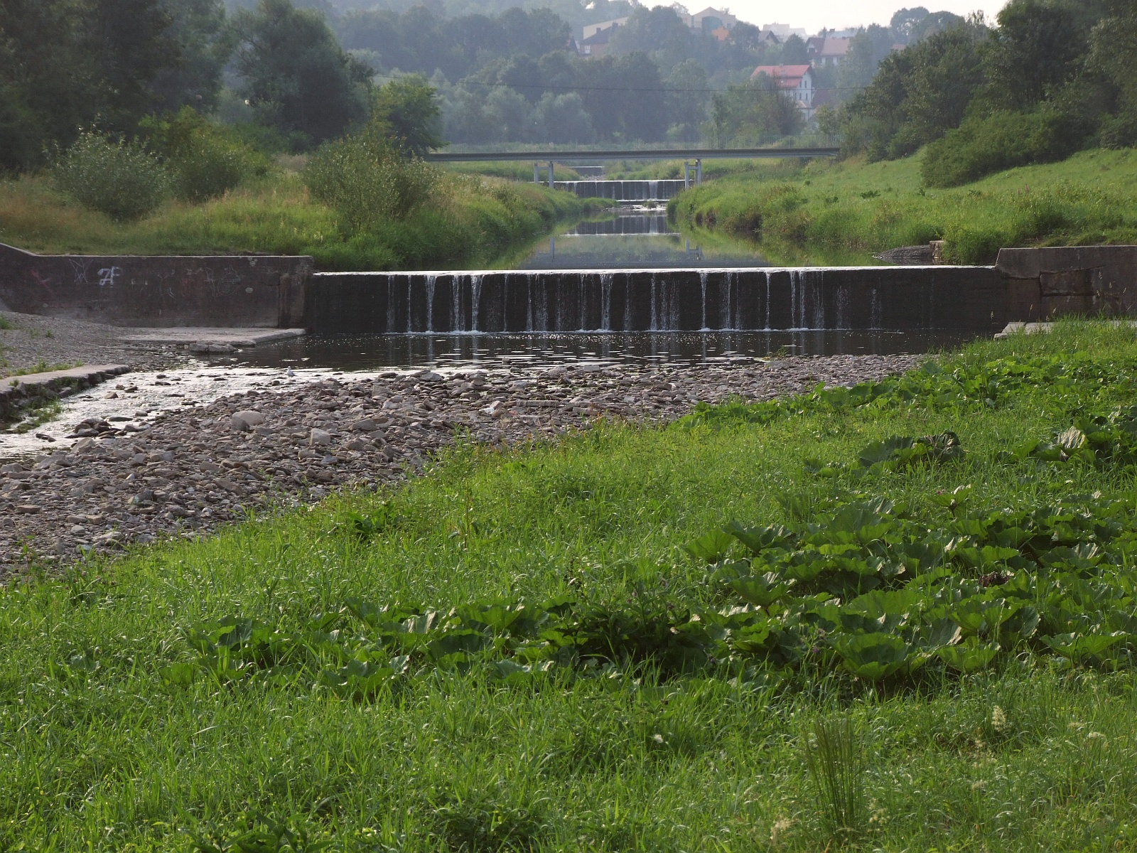 Rzeka Sowlina w Limanowej